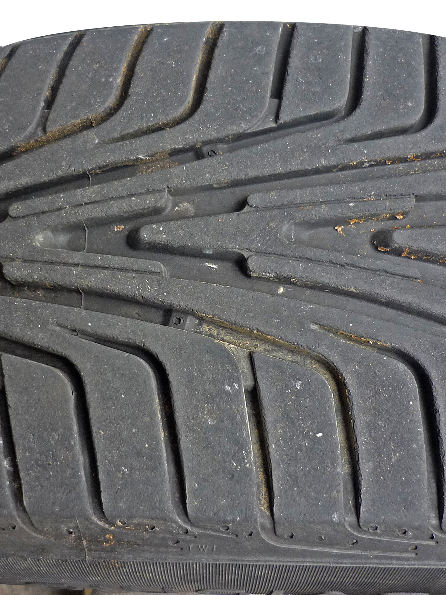 Vredestein SPORTRAC 3 195 65 R15; Reifenprofil zur Veranschaulichung der Reifenverschleißanzeige